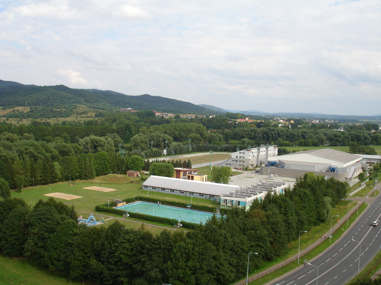 Sanok, Błonia; zespół sportowo-rekreacyjny, przy drodze DK28